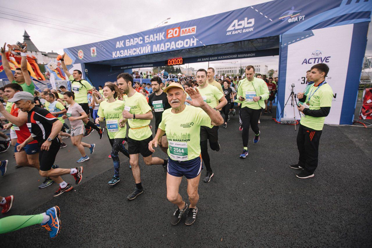 Казанский марафон 2018